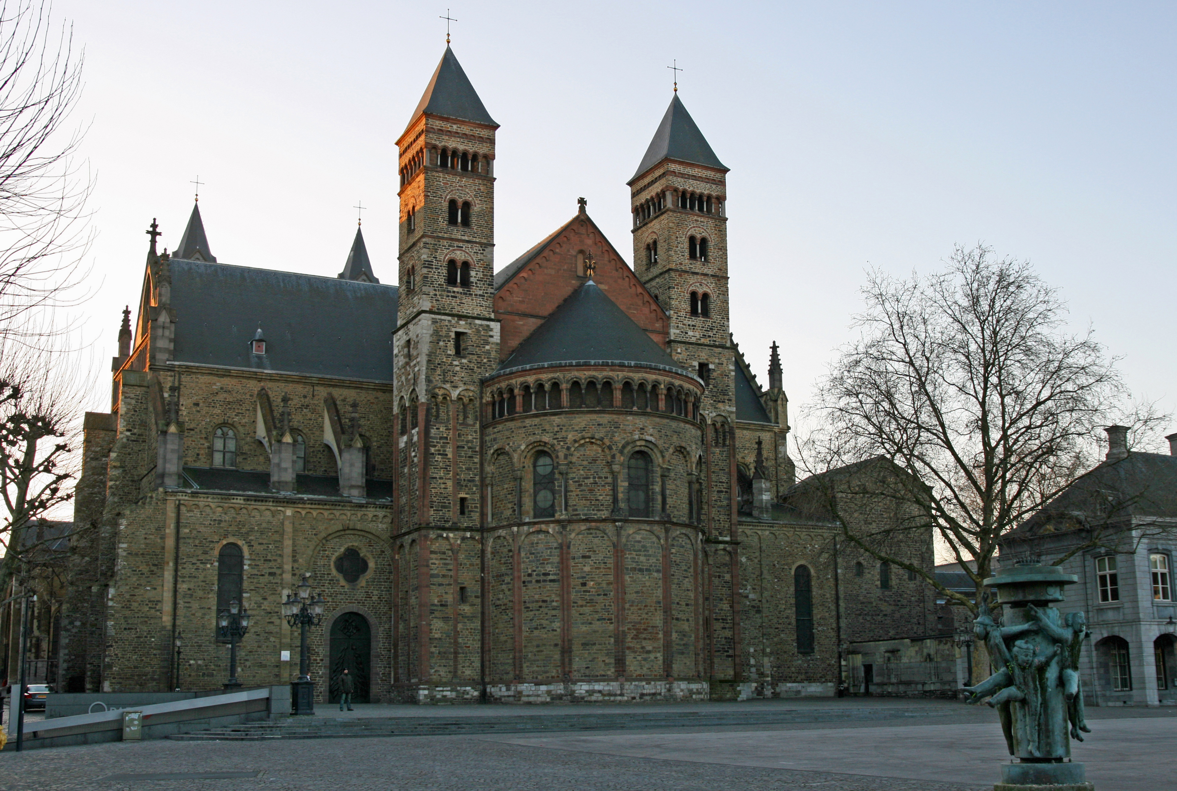 Vrijthof